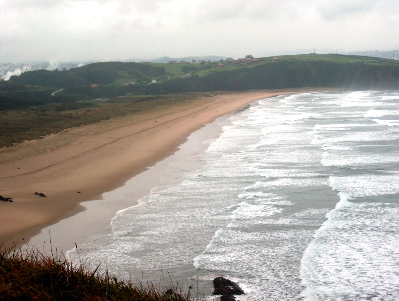 Playa de Xago (Asturias)